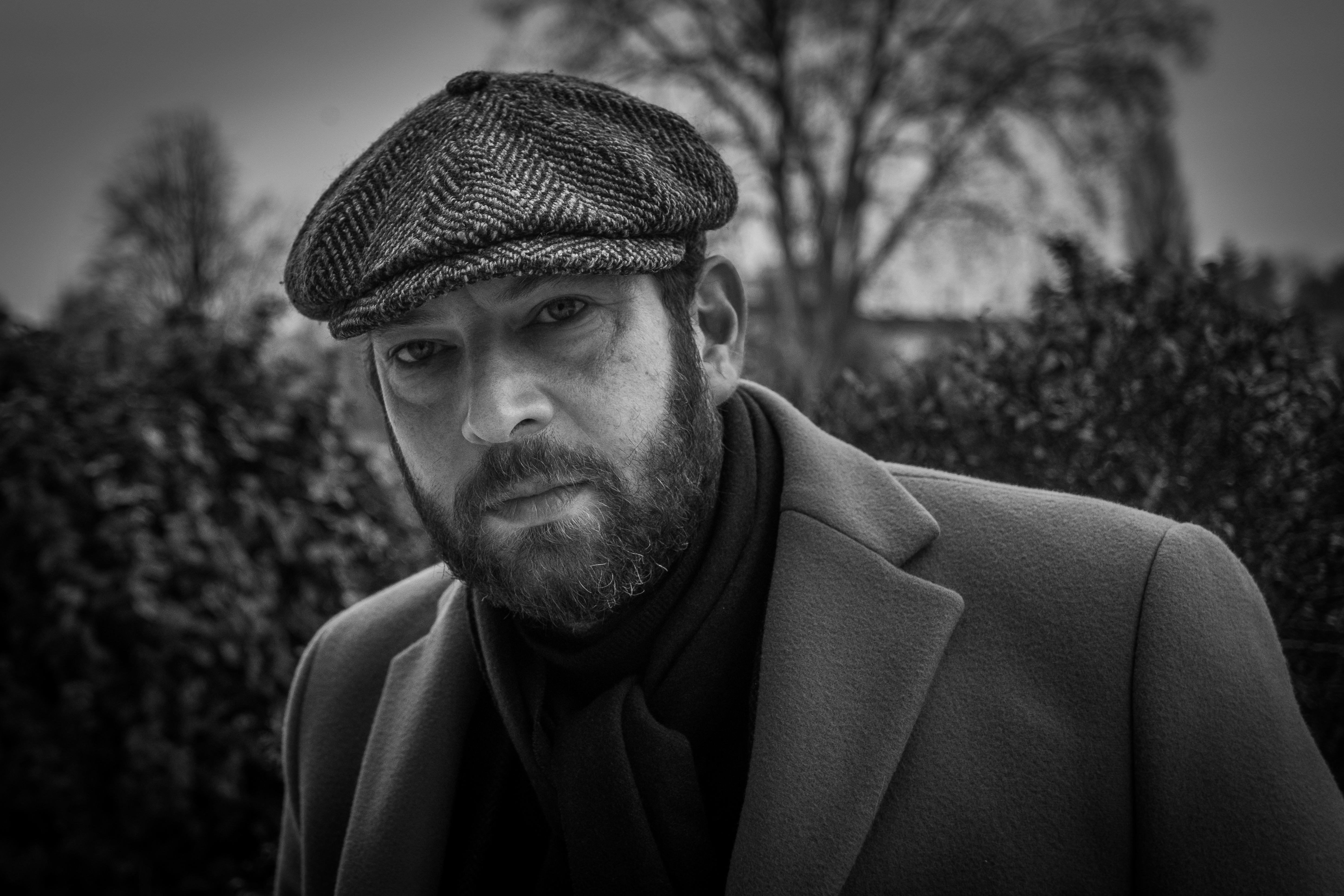 Olivier Guez par Claude Truong-Ngoc